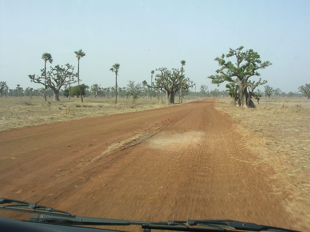 Aspecto de una carretera senegalesa, Dakar-Niominca